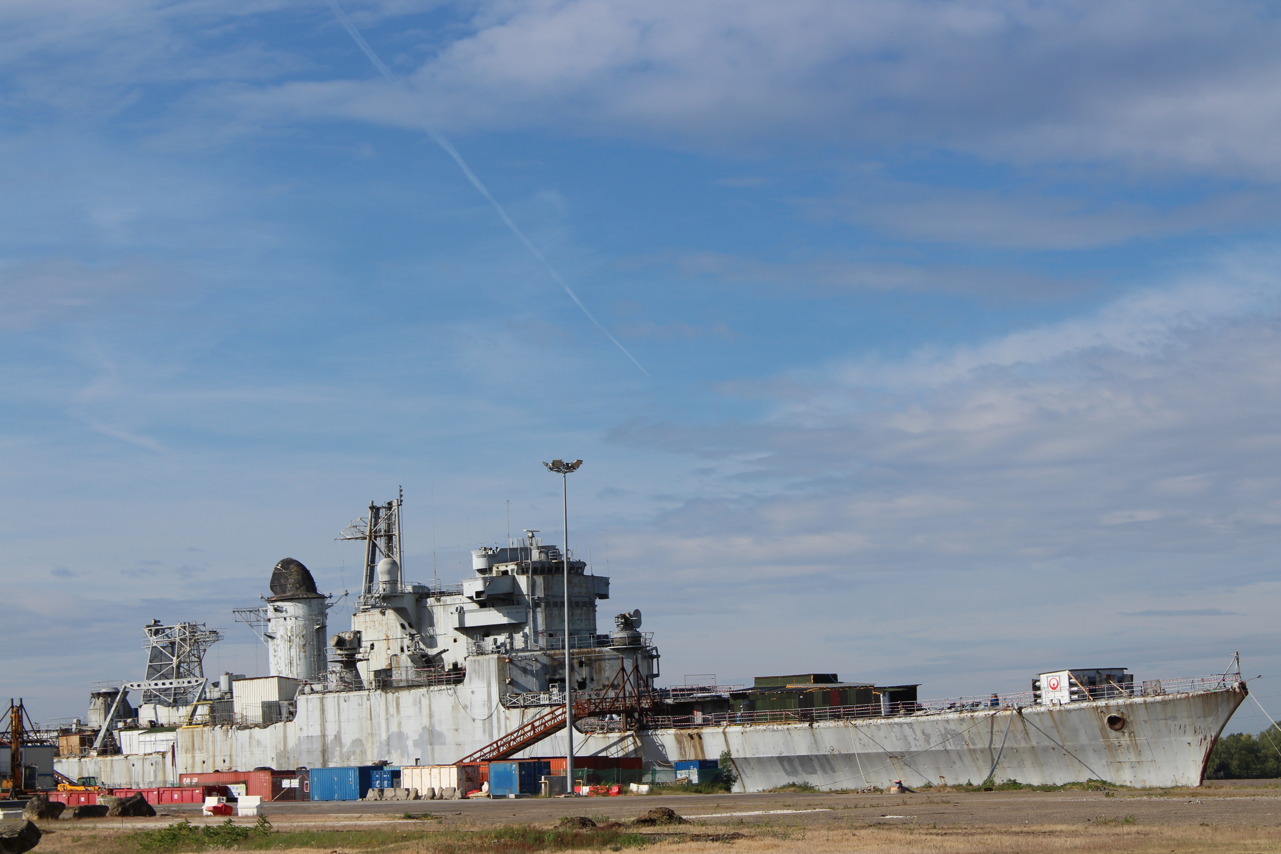 Le Colbert (croiseur, C 611) en déconstruction au port de Bassens (Gironde, France). Ancien bâtiment de la Marine nationale française, désarmé en 1991. Arrivé du cimetière de bateaux de Landévennec (Bretagne) le 5 juin 2016.